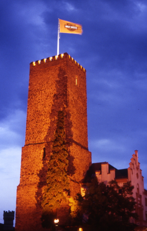 Boosenburg am rechten Ufer des Rheintals knapp oberhalb der Brömserburg in Rüdesheim am Rhein